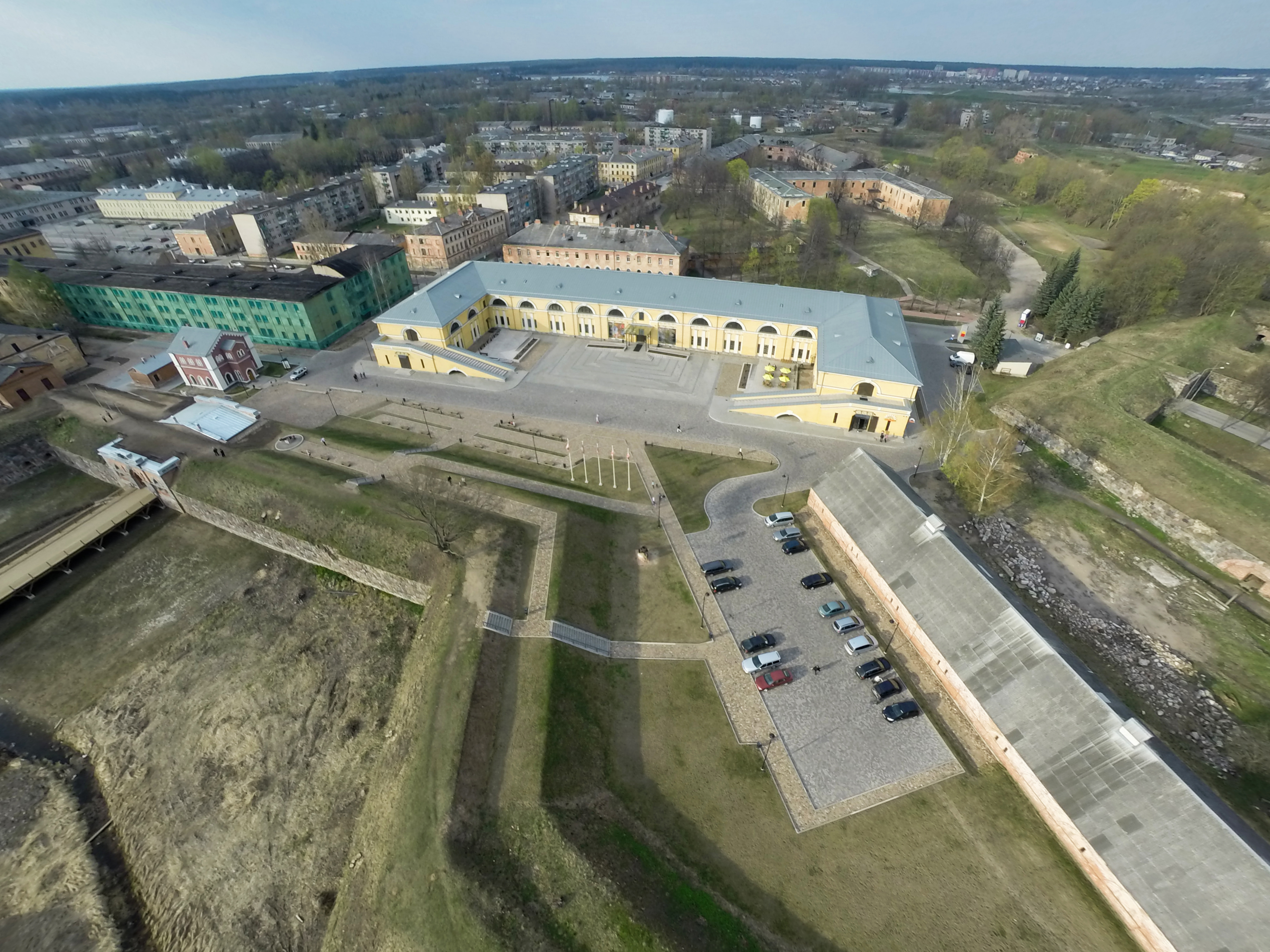 вид на крепость